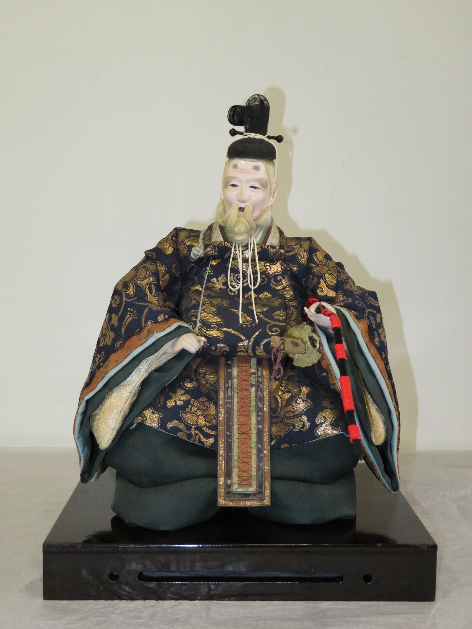 2018年2月27日-3月18日 東京国立博物館展示風景